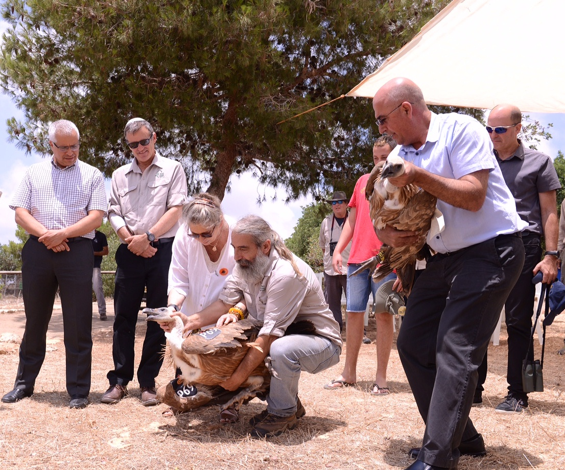 רעיית נשיא מדינת ישראל נחמה ריבלין שחררה לטבע את הנשרים "נחמה ורובי" בטקס לציון 20 שנה ל"פורשים כנף", בחי-בר כרמל.